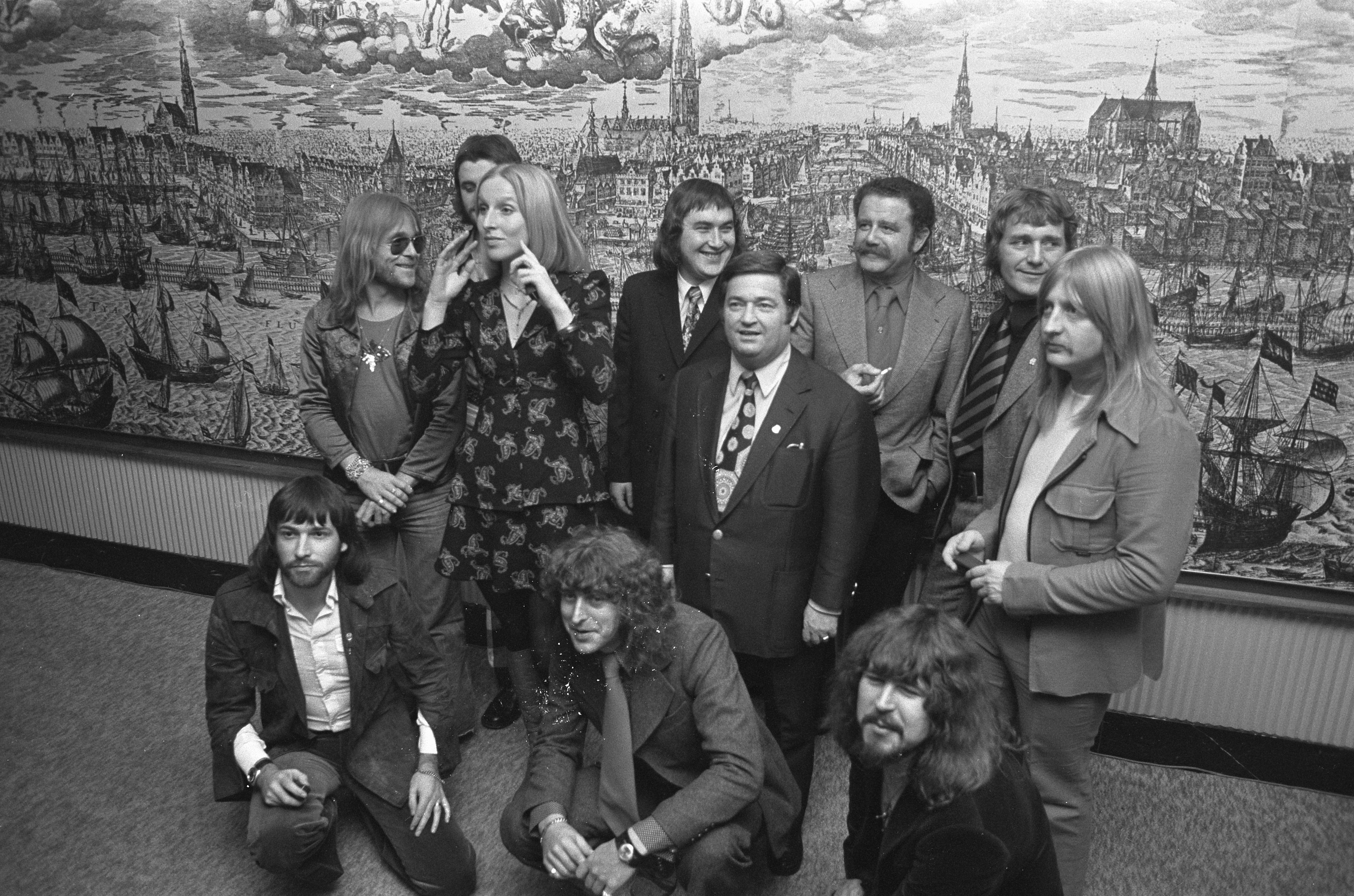 The Cats, met Henk Elsink, Eli Asser en Willy Alberti. Reacties Geplaatst door Musicfan op 26 juni 2016 - 14:25. De Gouden Harp voor Boudewijn de Groot werd in ontvangst genomen door zijn (tweede) vrouw Alma Netten.